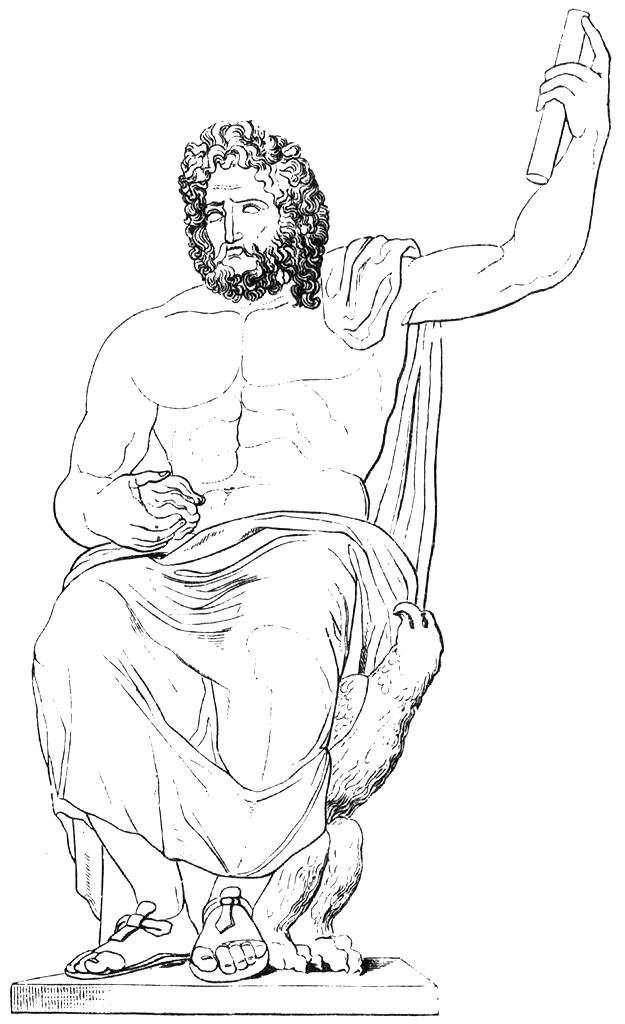 Greek God Zeus